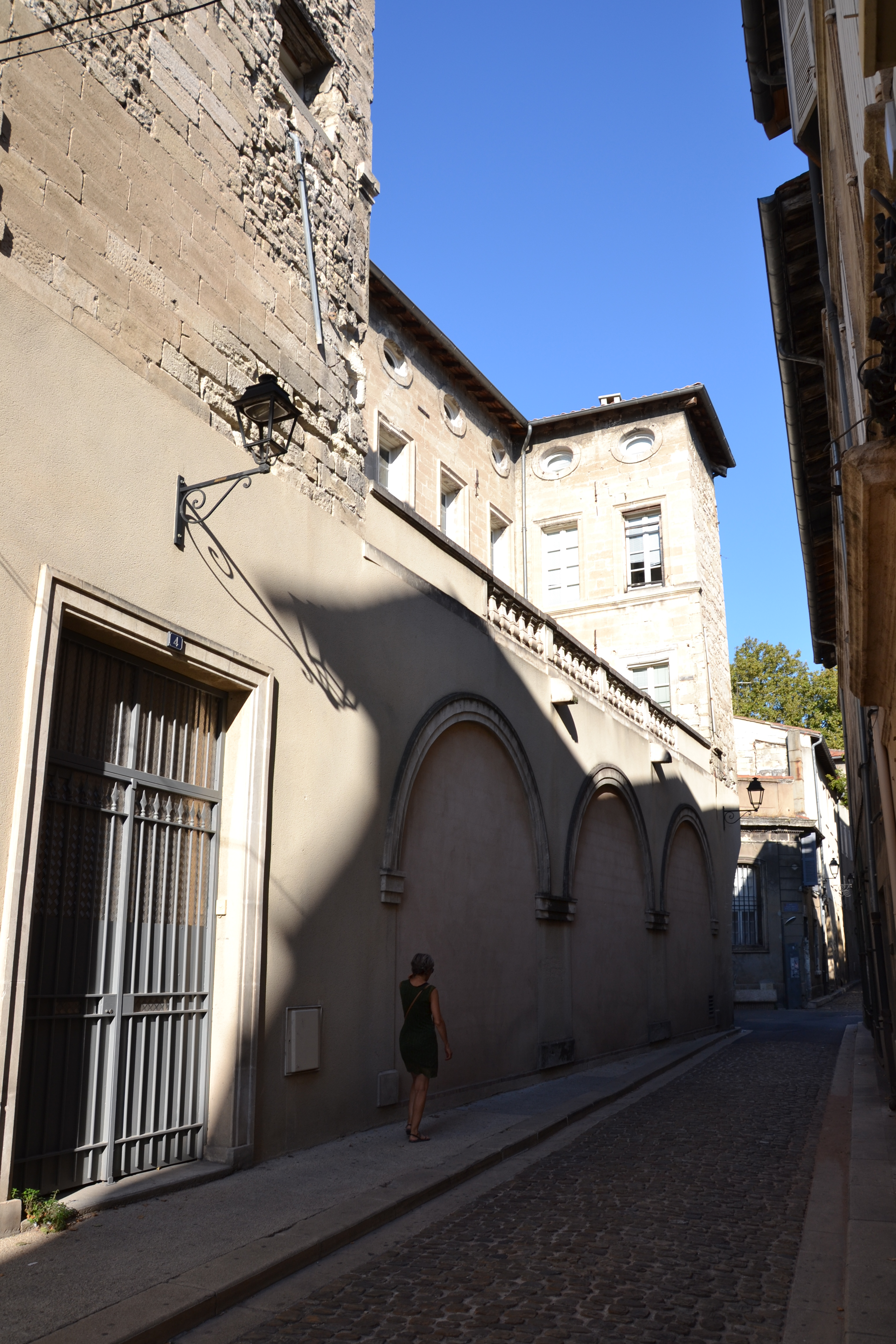 Couvent de Sainte-Praxèdeescalier de l'infirmerie (inscrit)